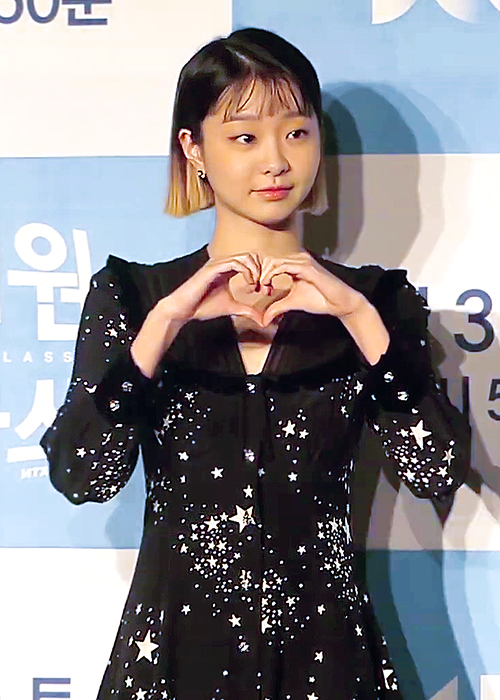 200130 박서준X김다미X유재명X권나라, 이태원을 장악할 단밤 (JTBC '이태원 클라쓰' 제작발표회)